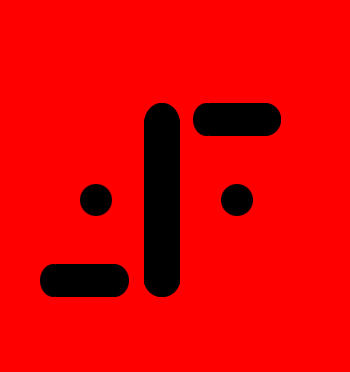 Invasión Extraterrestre